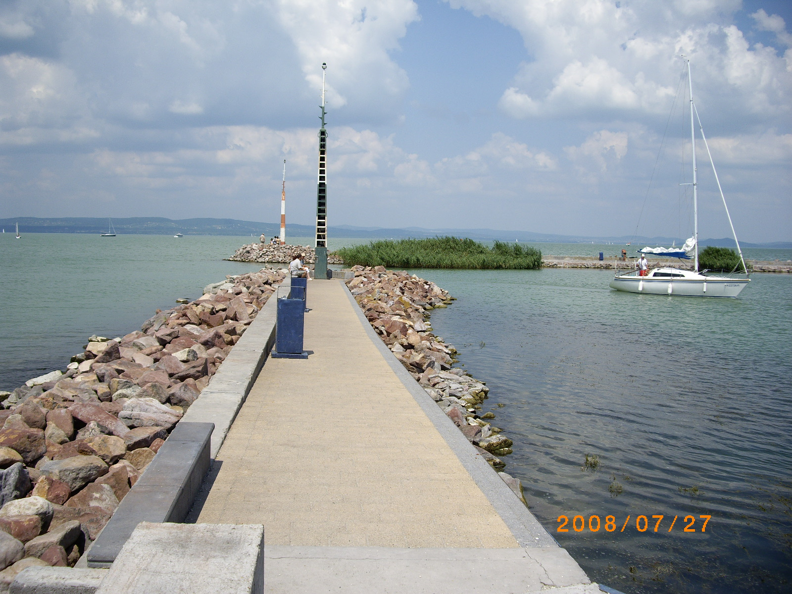 Balatonszemes kikötő